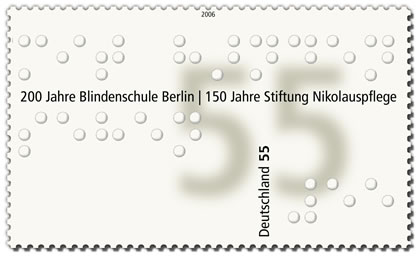 Dienst am Nächsten - 200 Jahre Blindenschule Berlin und 150 Jahre Nikolauspflege. Es ist die erste Briefmarke Deutschlands mit einem geprägten und damit von Blinden tastbaren Schriftzug ("Mit Händen sehen" sowie der Wertangabe "¢55")